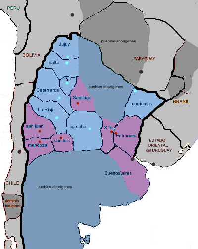 mapa de las provincias unidas en 1940